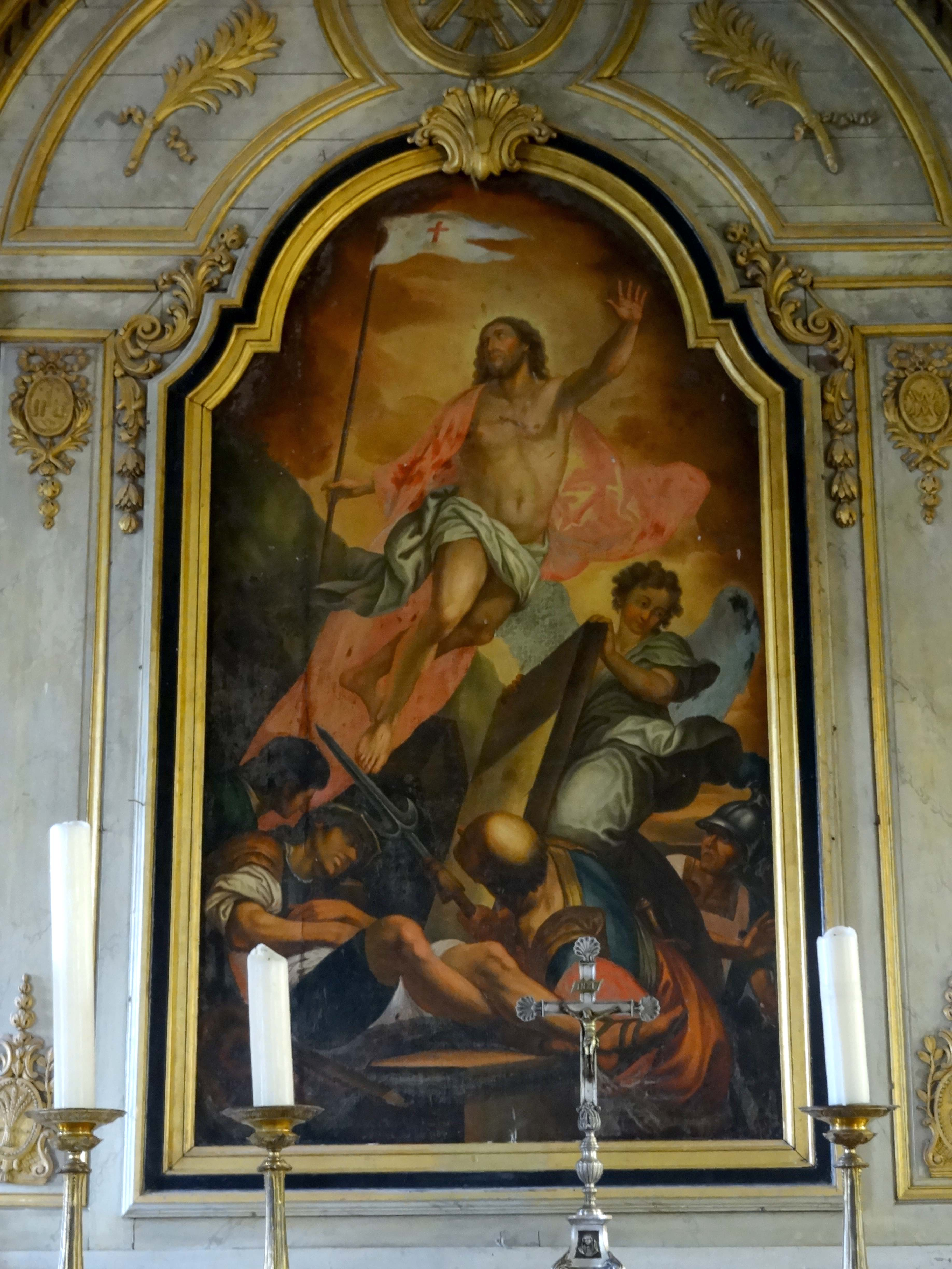 Tableau de retable - La Résurrection, par J.-B. Duchesne, Gisors, XVIIIe siècle.